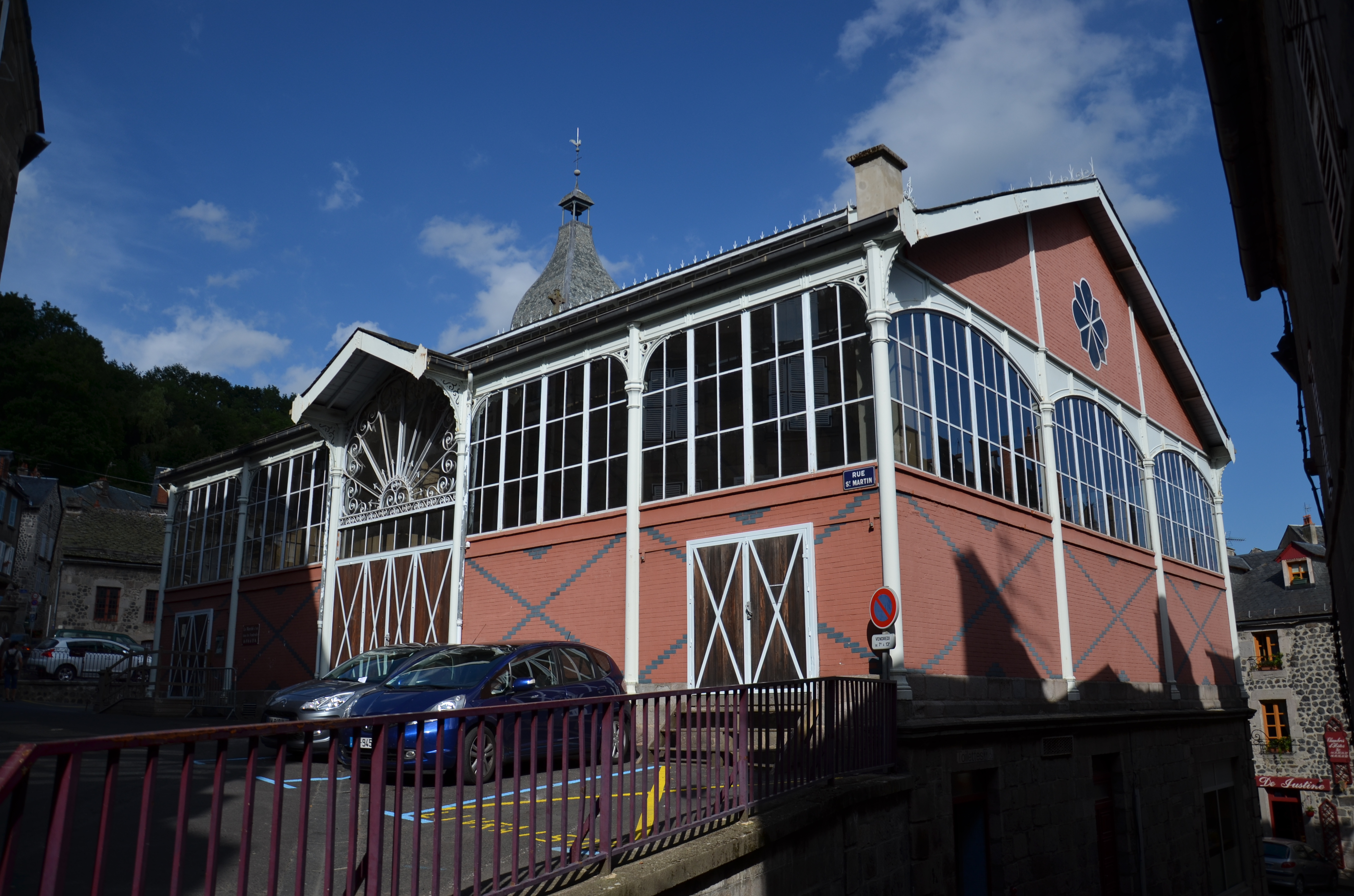 Halle (Inscrit) .